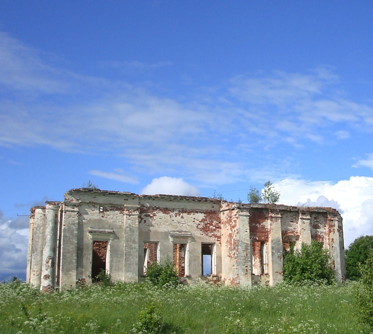 (Вологодская область, Белозерск, посёлок Карла Либкнехта) Таким образом выглядит церковь, если идти к ней из поселка.